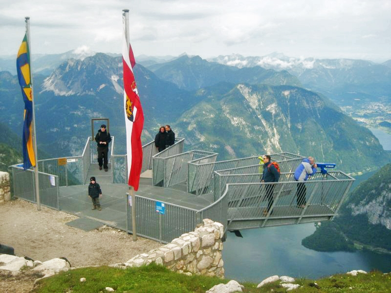 5 Fingers am Krippenstein, Dachstein, Österreich/Austria